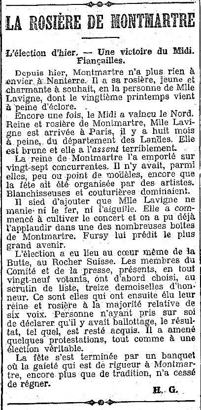 Article sur l'élection de la première rosière de Montmartre.